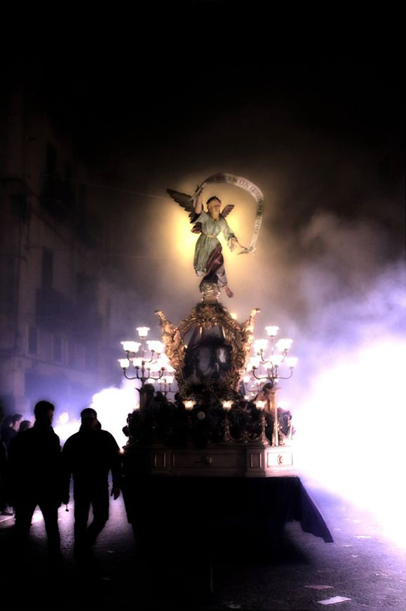 La Sacra Urna Una Penultima Vara Usata Durante il Giovedi Santo a Caltanissetta Foto Di Giuseppe Sanalitro